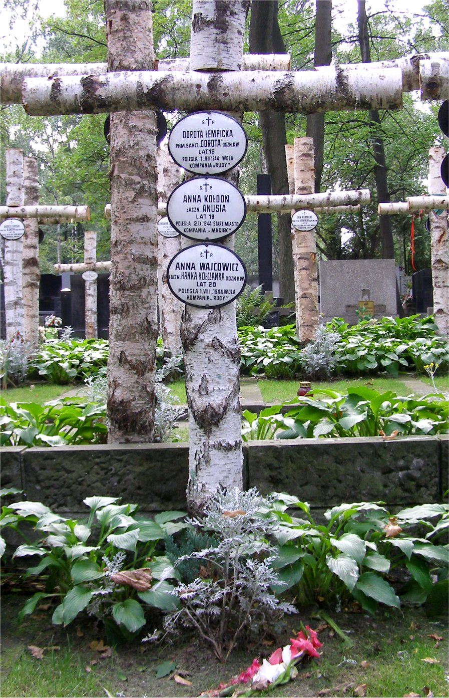 Grób Anny Wajcowicz "Hanki Kołczanki" na Powązkach Wojskowych w Warszawie (fot Zu)